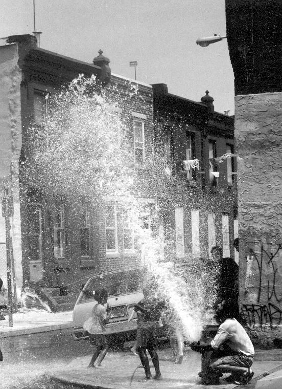 Fire hydrant in Philadelphia